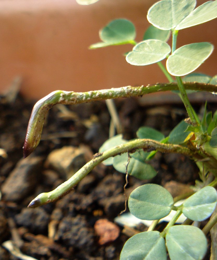 Tiges d'arachide portant des ovaires fécondés (futures gousses) et se dirigeant vers le sol